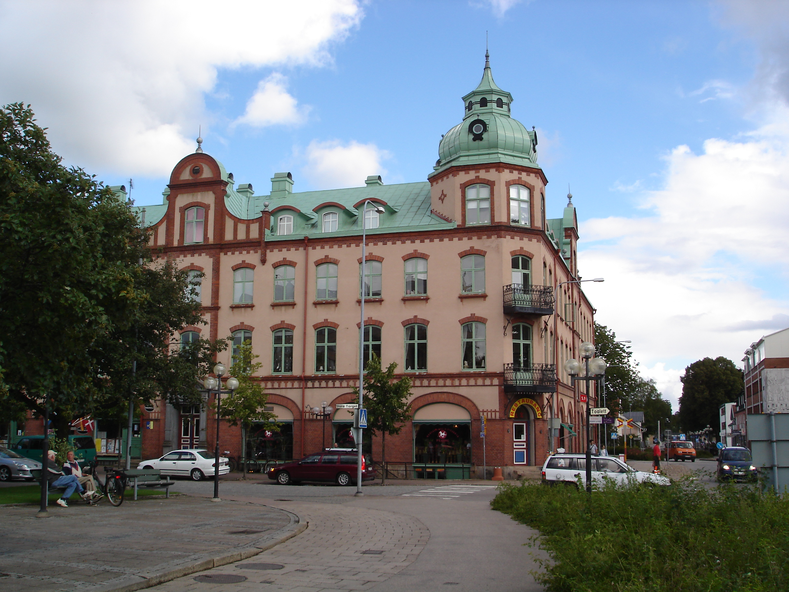 Das Tellushuset in Ljungby (Schweden)